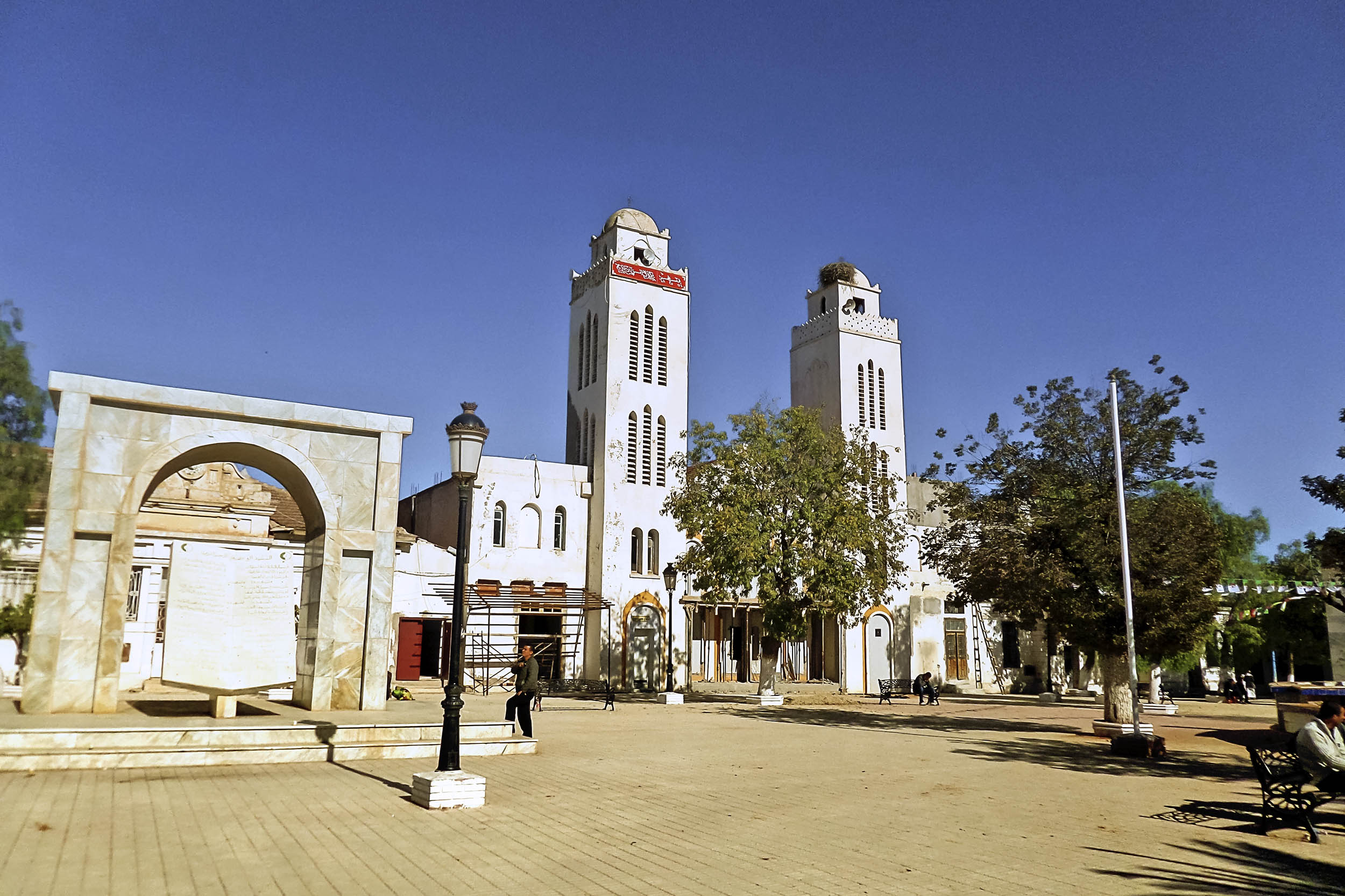 Tissemsilt تيسمسيلت